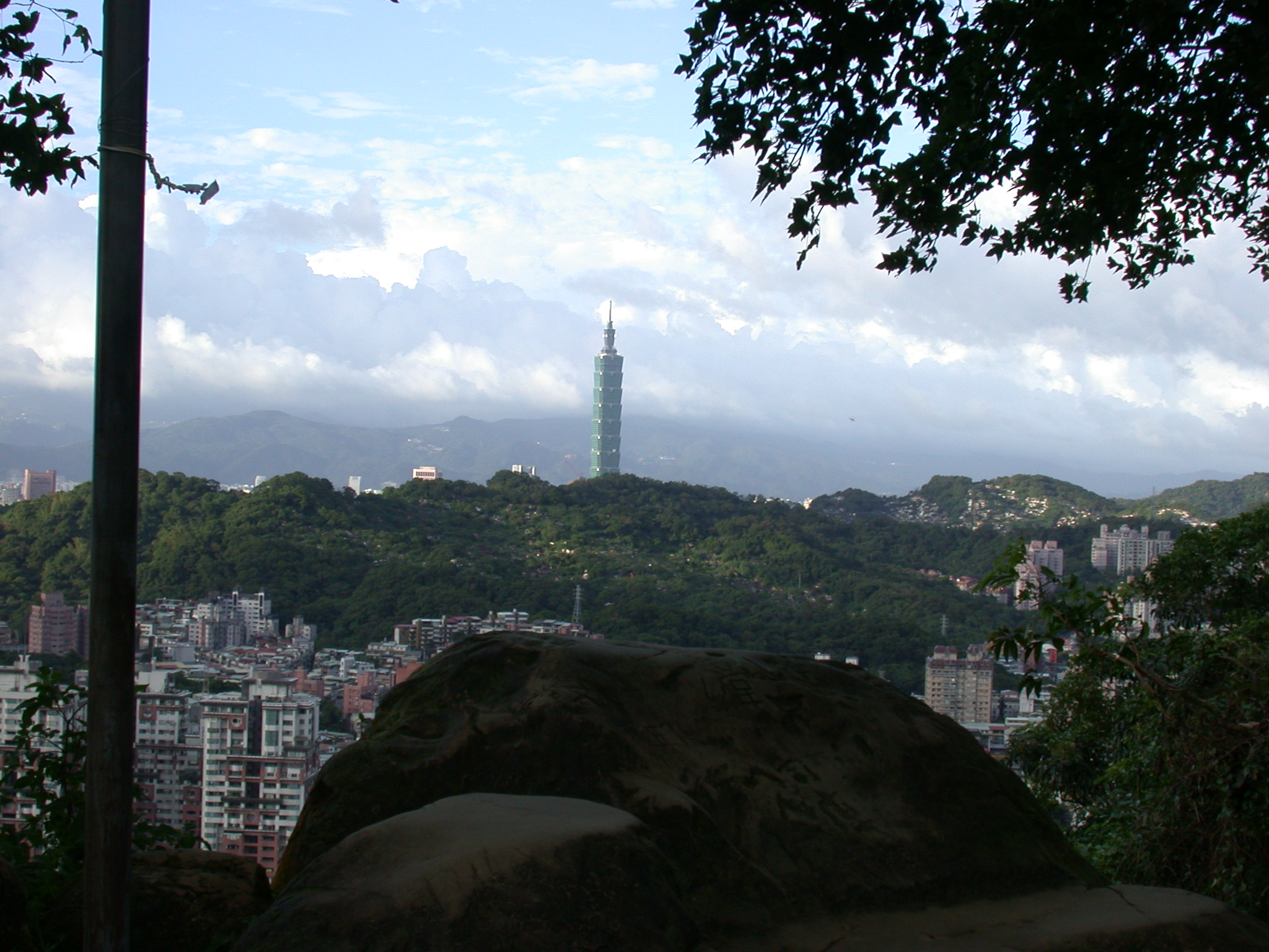 Bân-lâm-gú: 溪仔口山山頂，對面是螿蜍山，閣較遠是臺北101。